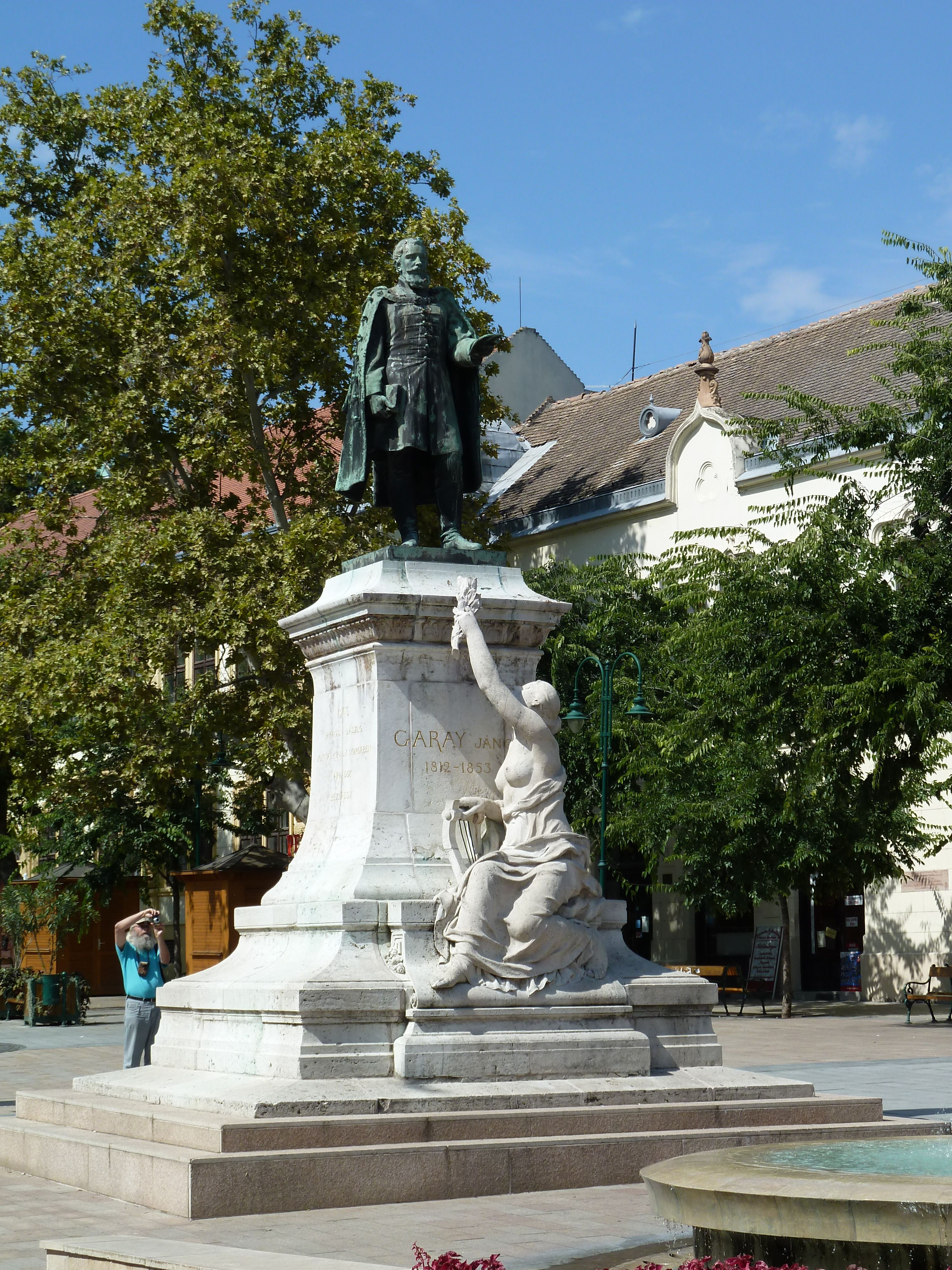 Garay János szobra, Szekszárd